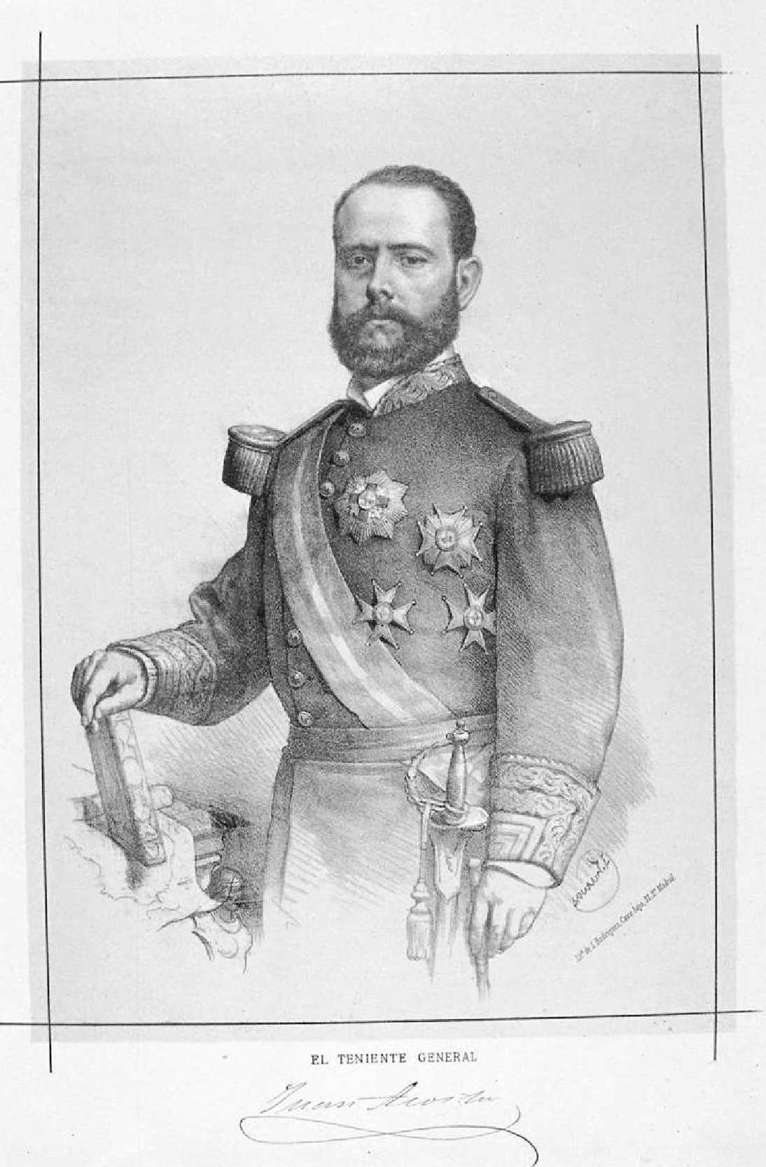 Juan Acosta y Muñoz, litografía de José Cuevas. Biblioteca Nacional de España